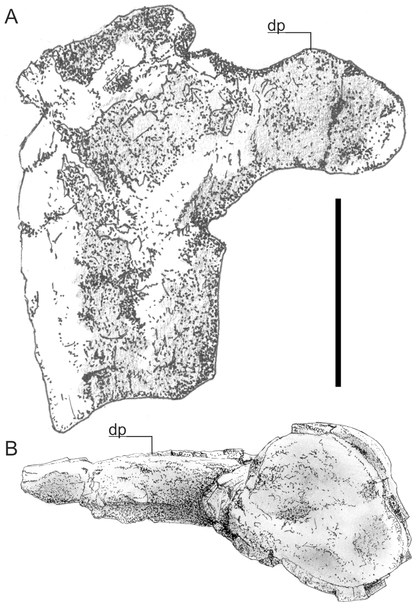 A, left Hatzegopteryx humerus in ventral view; B, distal view.